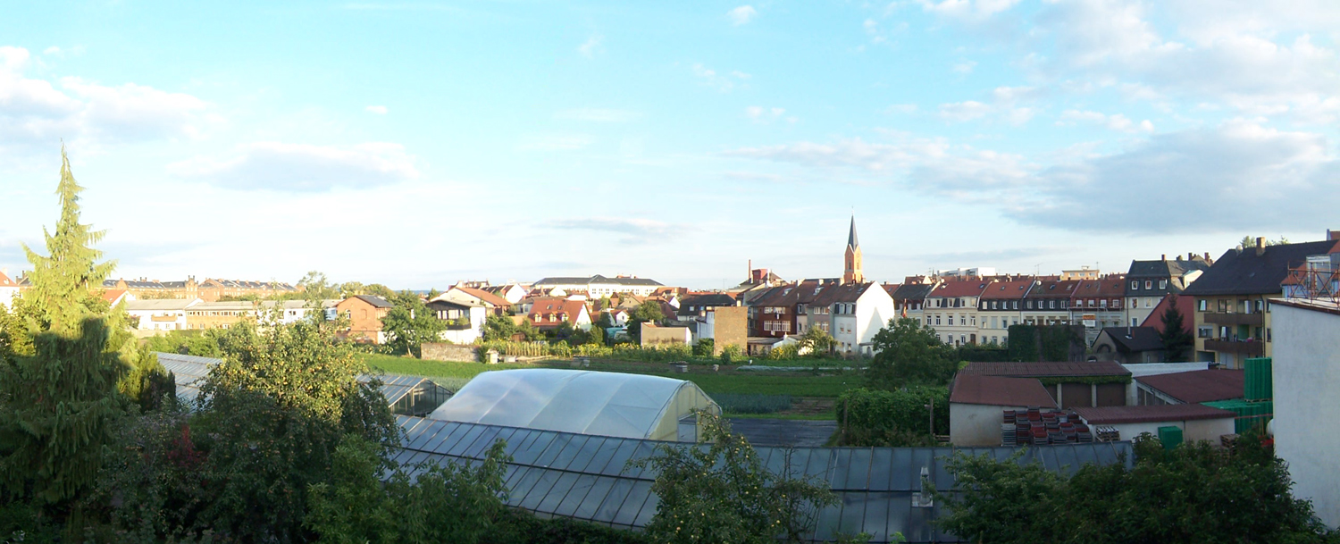 Panorama mit (von links) Koppenhofkaserne, Wunderburger Schule, Brauerei, Pfarrkirche. Gärtnerland im Vordergrund.